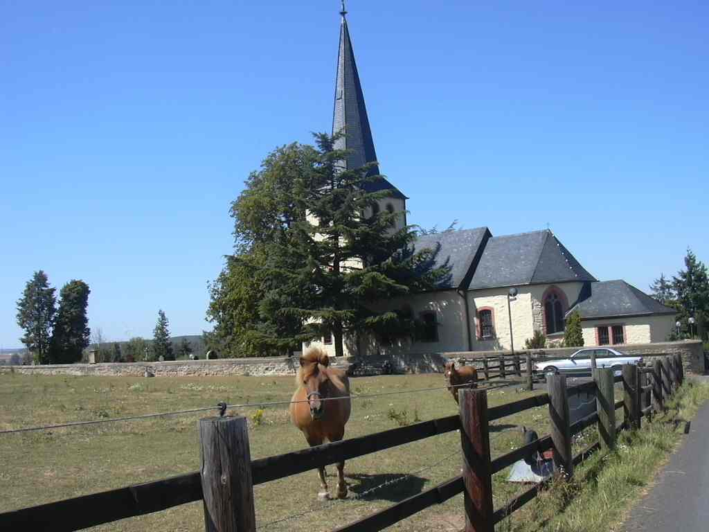 Juntersdorf